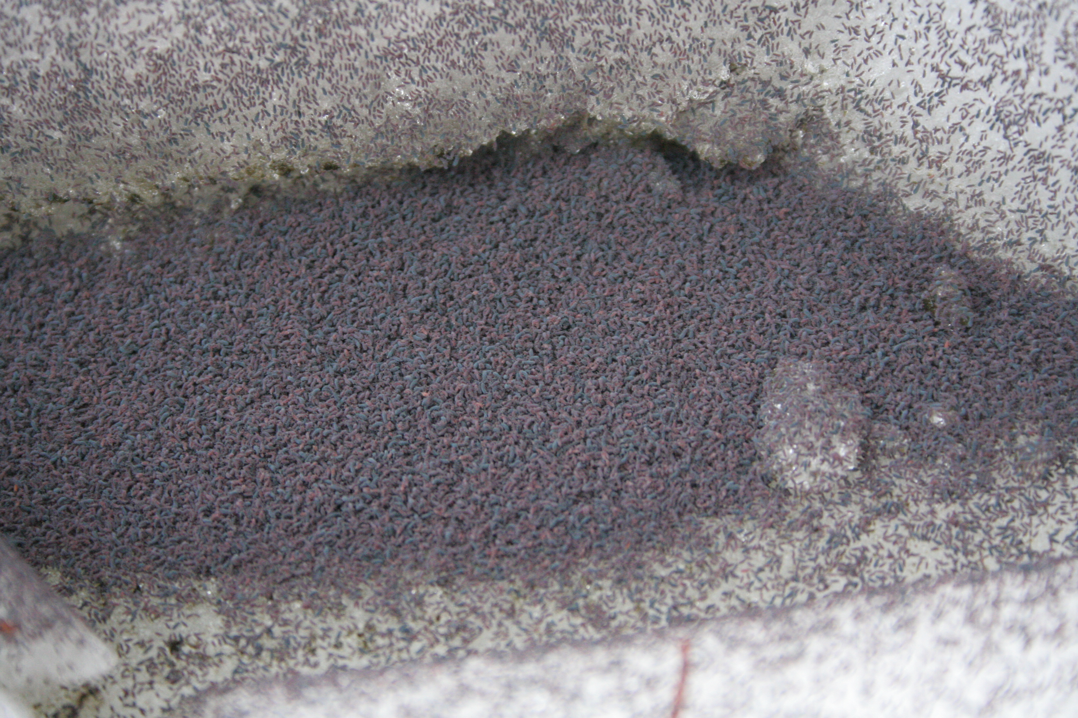 Schneefloh Überpopulation (Desoria nivalis (Carl, 1910) (syn. Isotoma nivalis)) in einem Wald bei München